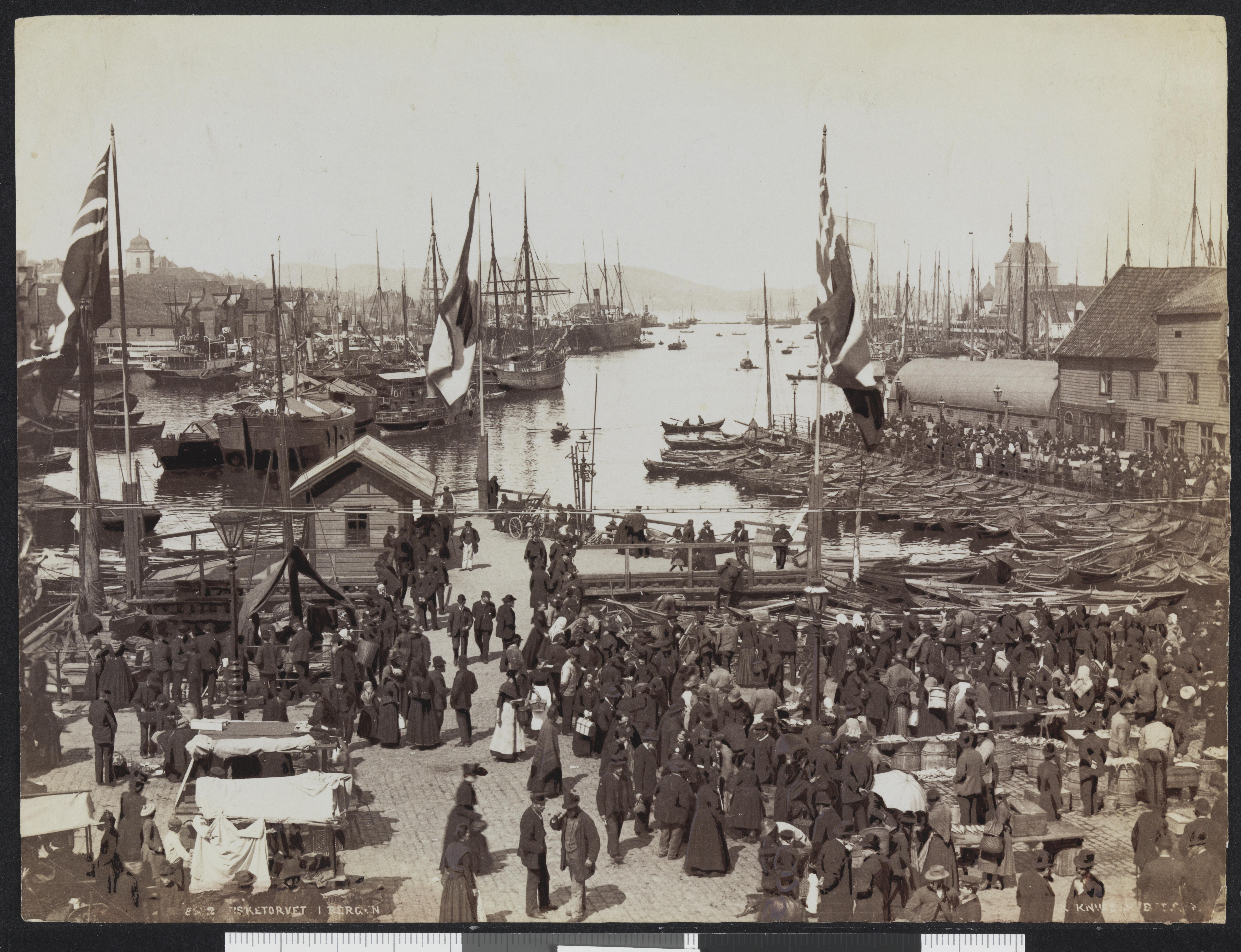 Bildet er hentet fra Nasjonalbibliotekets bildesamling Fisketorvet, Bergen, Hordaland